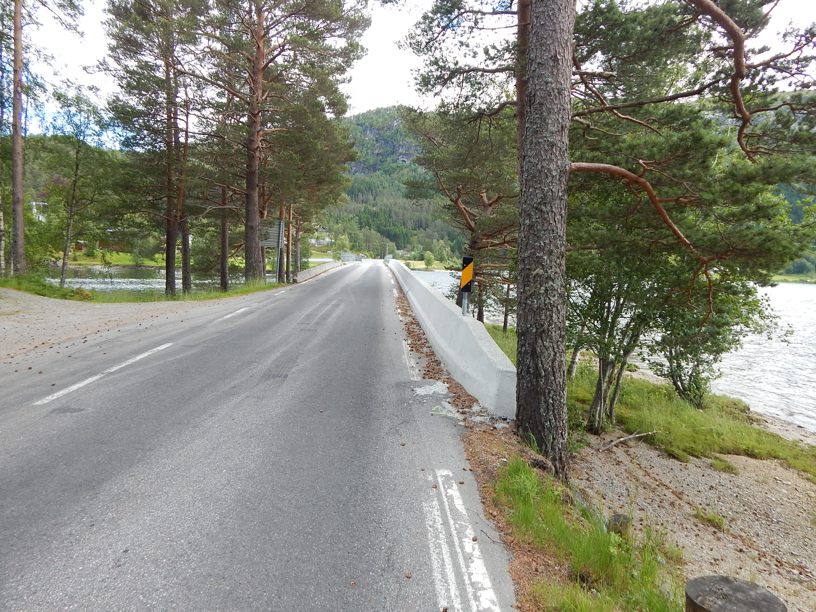 Kirkelisund bru fører primær fylkesvei 610 over Gaulavassdraget mellom Vikedalsvatnet (t.v.) og Hestadfjorden